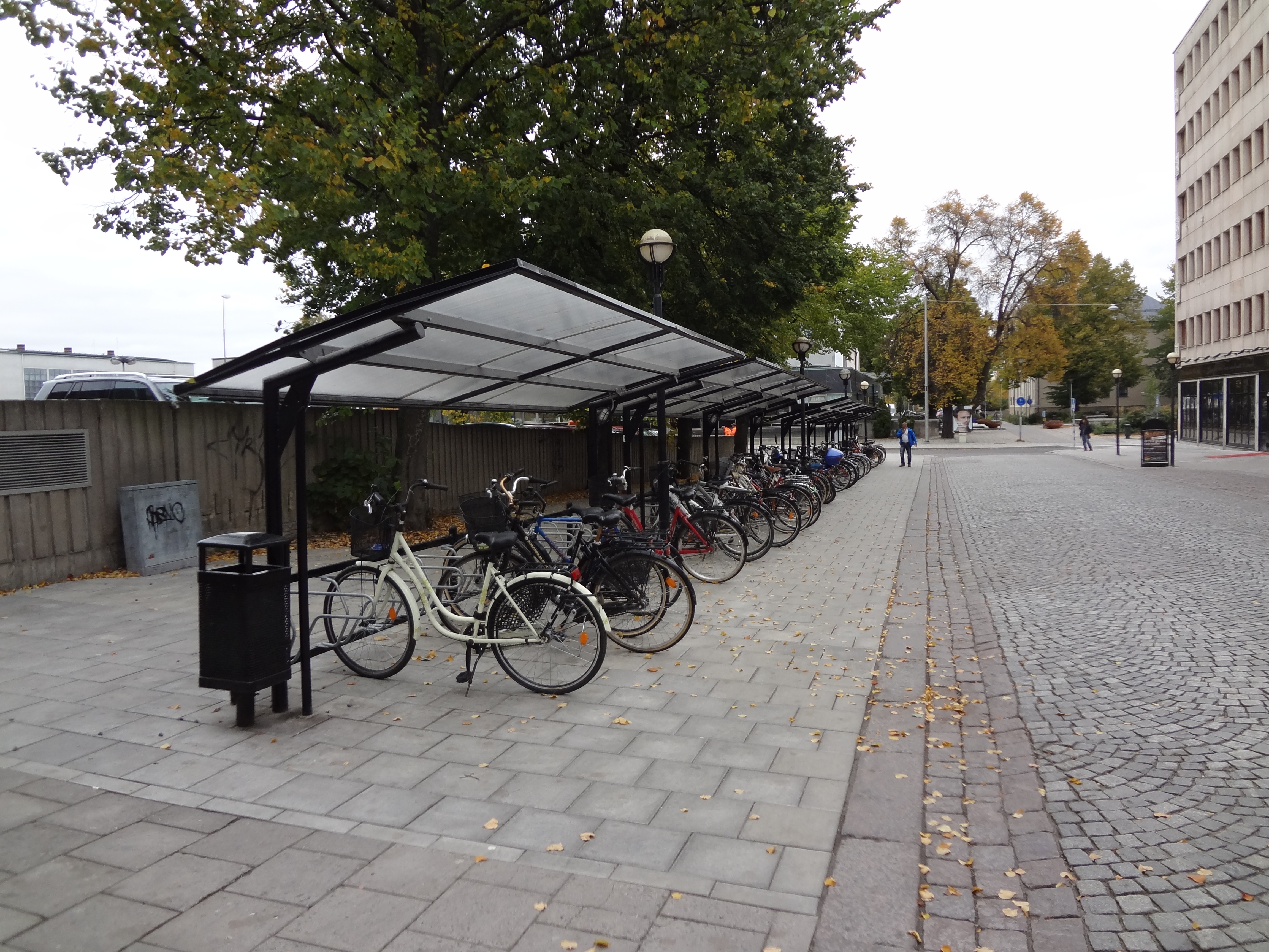 En cykelparkering på Kriebsensgatan i centrala Eskilstuna med riktning norrut.